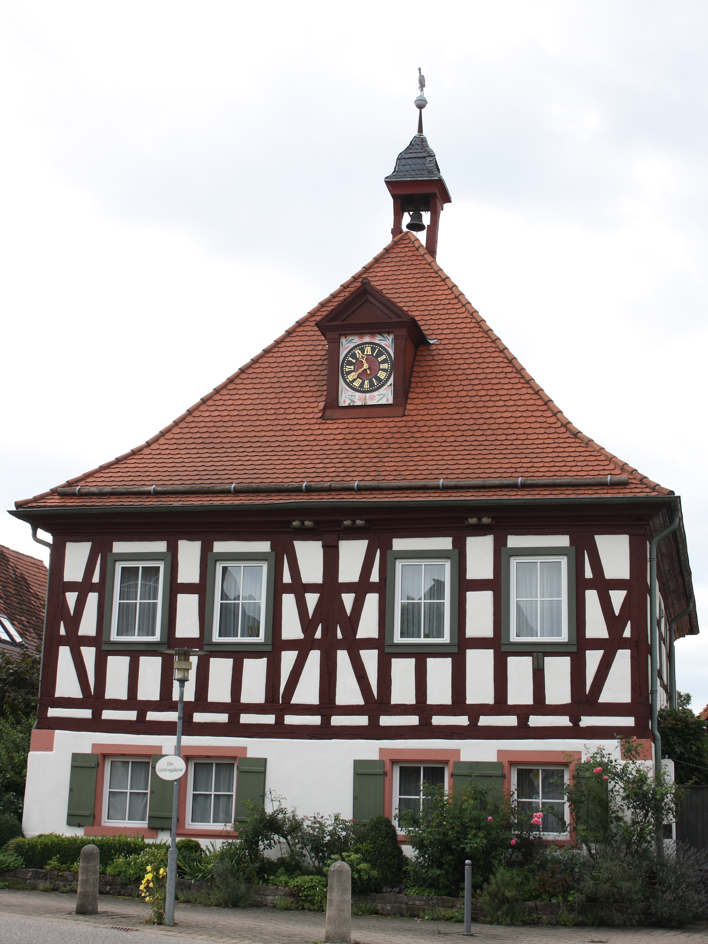 Altes Rathaus in Wössingen, Wössinger Straße 15